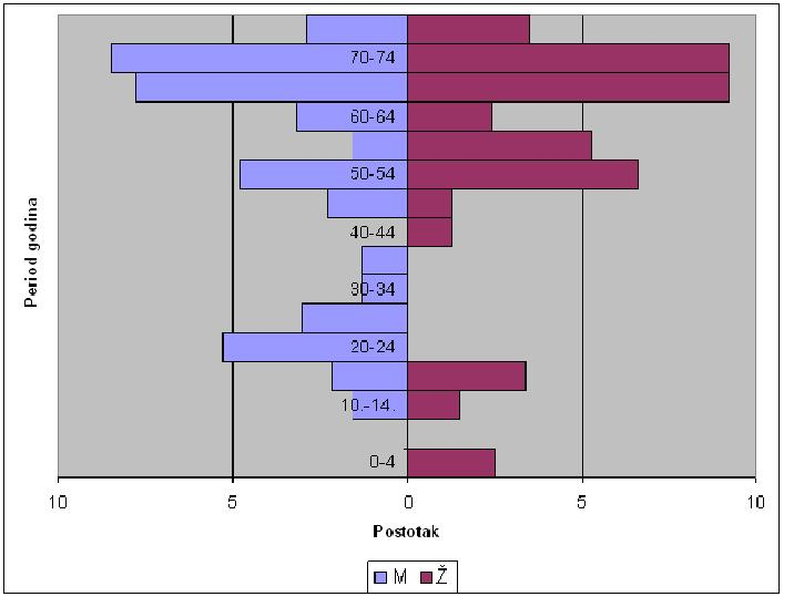 Piramida dobnog i spolnog sastava stanovništva otoka Sestrunja 1981. godine.